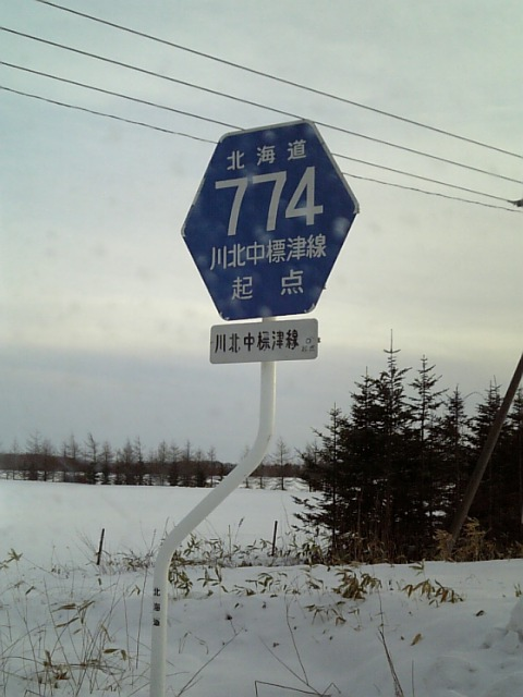 北海道標津町 北海道道774号起点標識